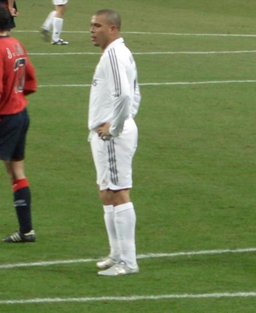 Ronaldo, atacante brasileiro em atuação pelo Real Madrid